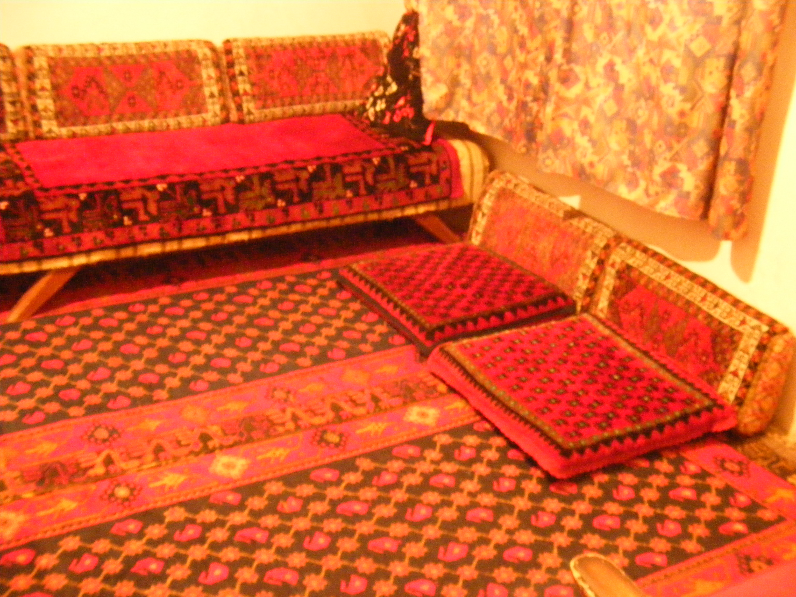 أثاث منزل من بلدة الفيكة لبنان